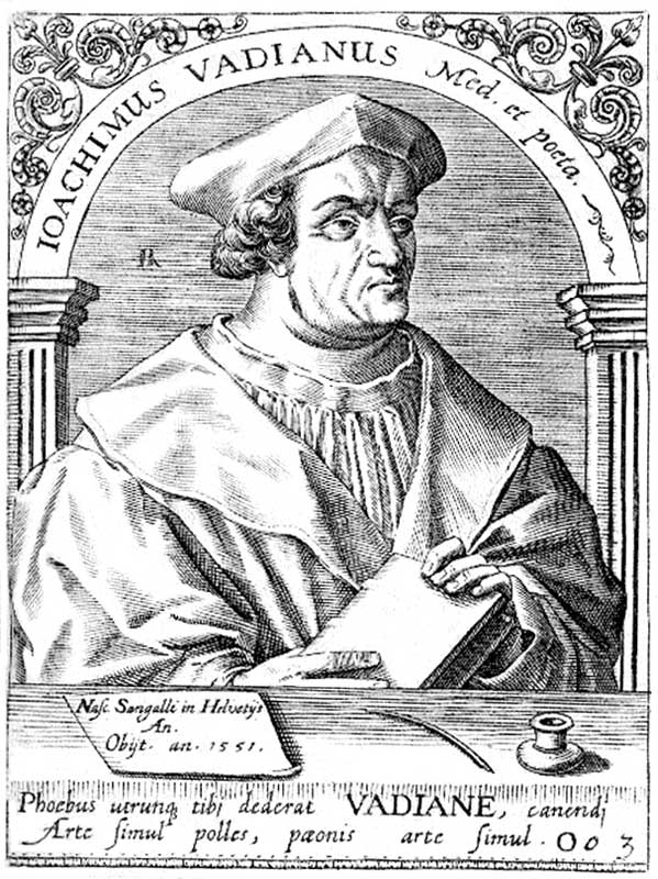 Kupferstich von Joachim von Watt oder Vadianus, Joachim (1484-1551); Humanist, Theologe, Bürgermeister von Sankt Gallen